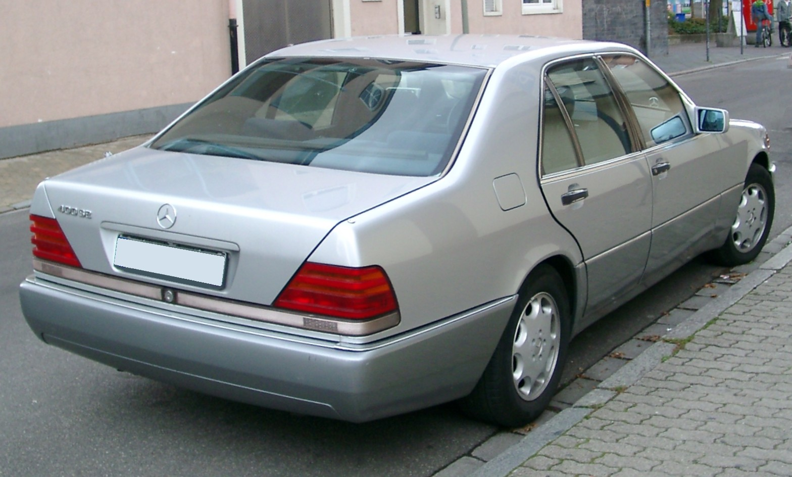 Mercedes-Benz Baureihe 140